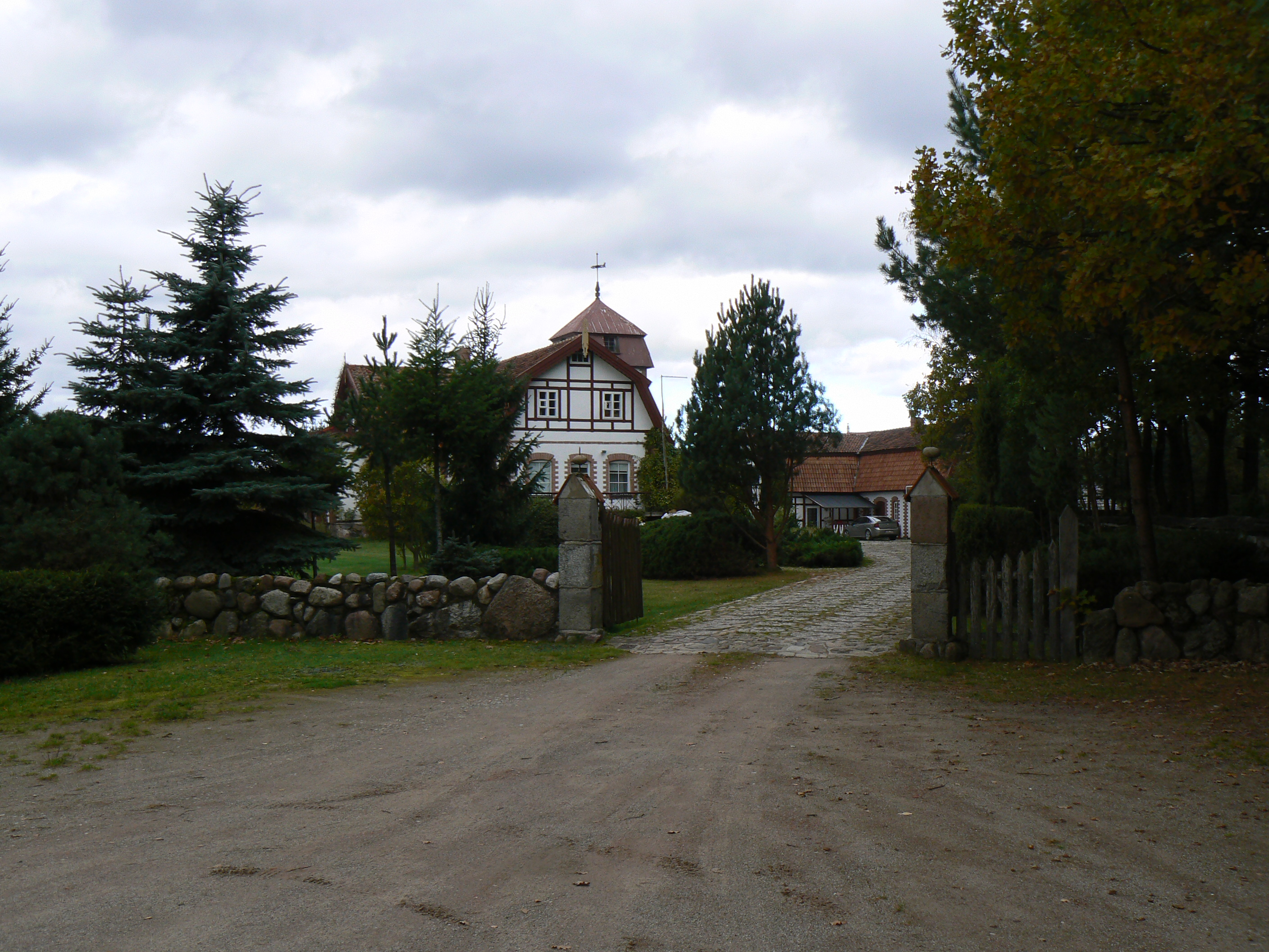 Agluonėnai: Dvůr Čepų sodybaLietuvių: Čepų sodyba Agluonėnuose